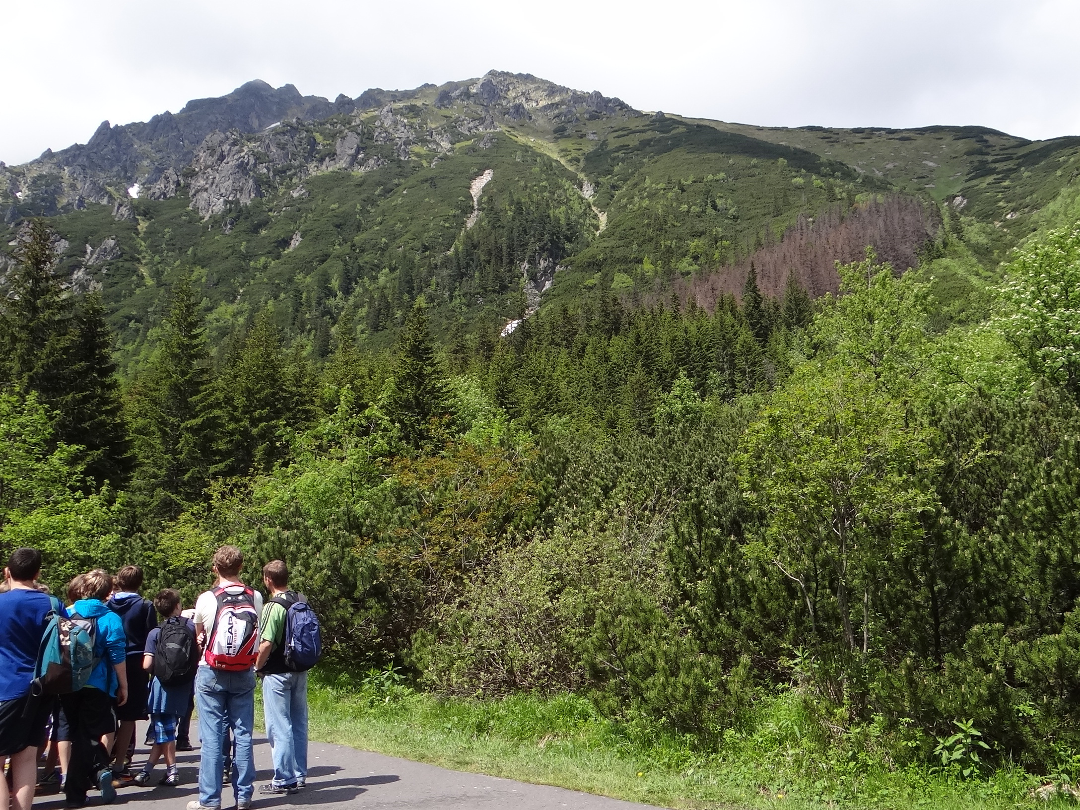 Widok z szosy powyżej Włosienicy